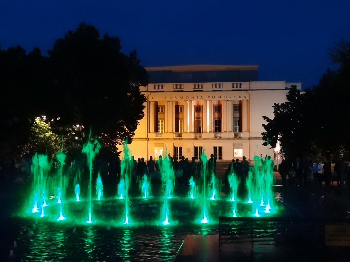 Fontanna przed budynkiem Filharmonii Pomorskiej im. Ignacego Jana Paderewskiego w Bydgoszczy, przebudowana w 2014 r., Dysponuje podświetlanymi dyszami wodnymi sterowanymi elektronicznie np. w rytm muzyki